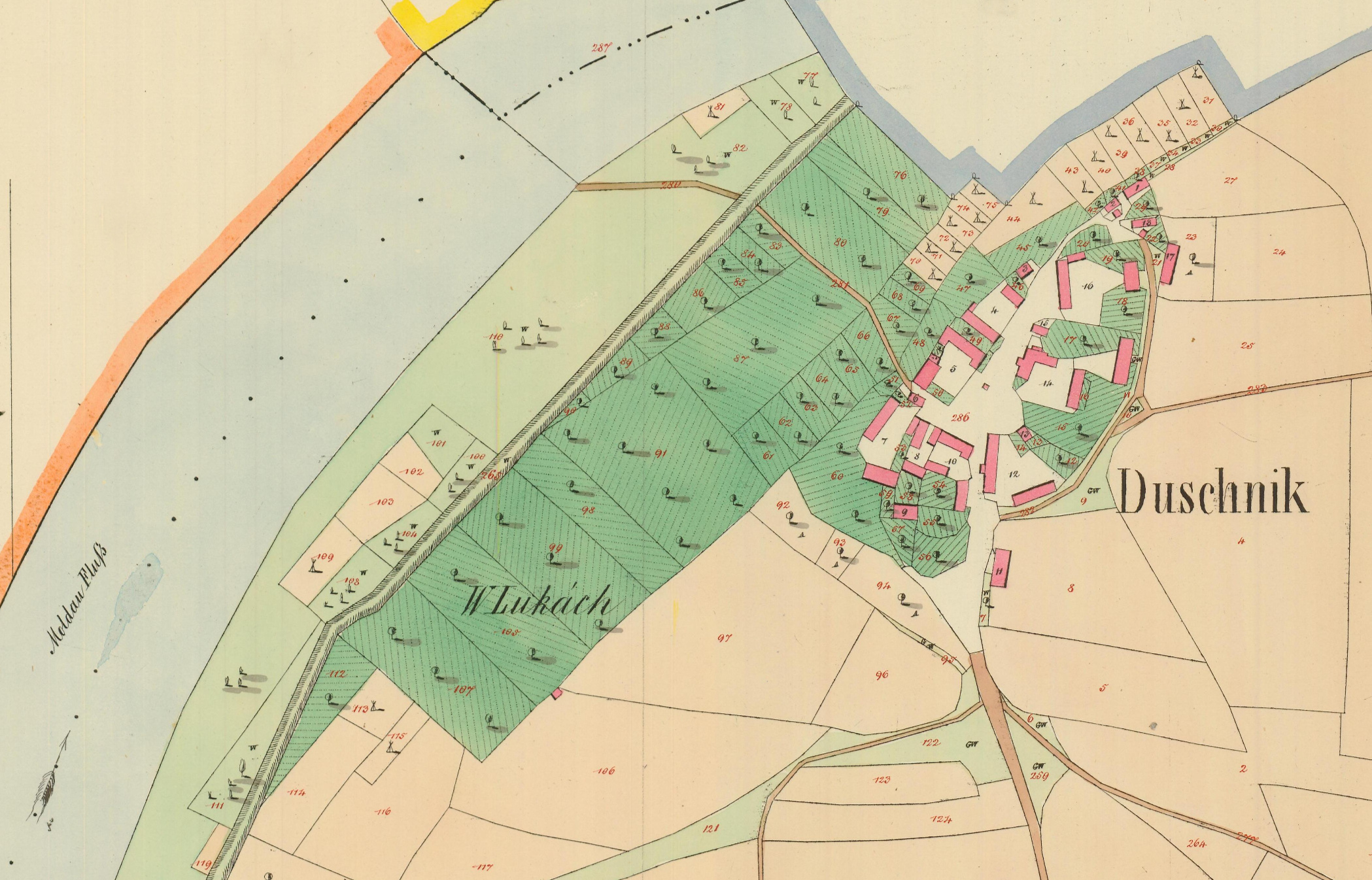 Dušníky na císařském otisku mapy Stabilního katastru z roku 1840 (Výřez z mapového listu kód 1616-1-001)